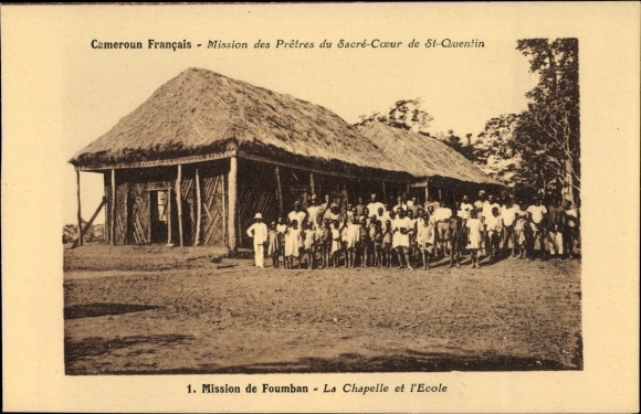 Mission de Foumban au Cameroun français, années 1920. Prêtres missionnaires du S.-C. de Saint-Quentin.